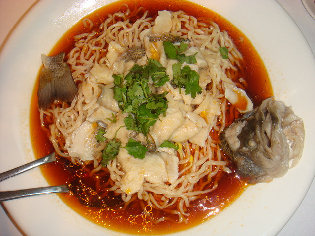 魚肉鮮嫩. 麵條夠Q